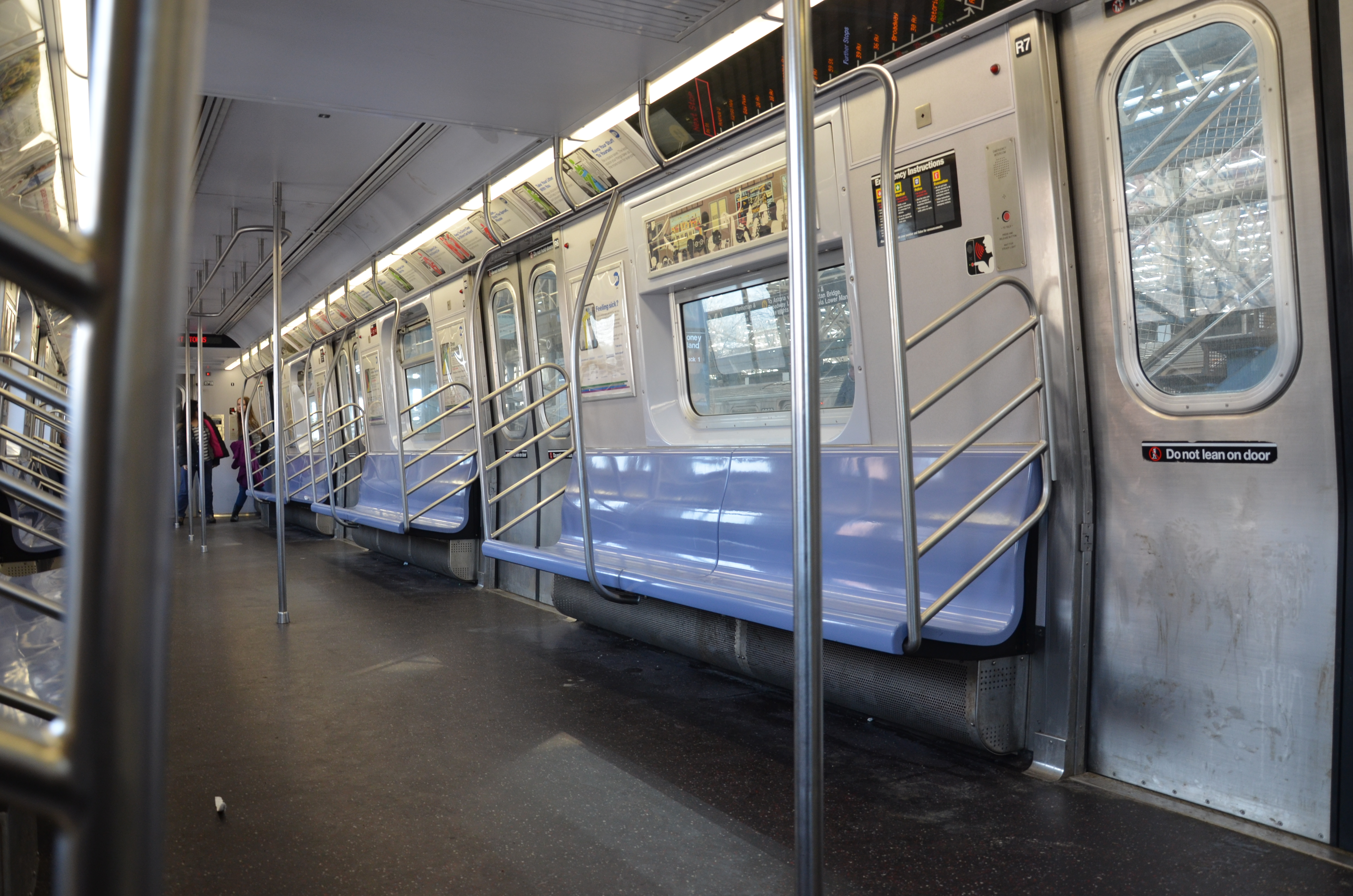 Het interieur van een New Yorkse metro.